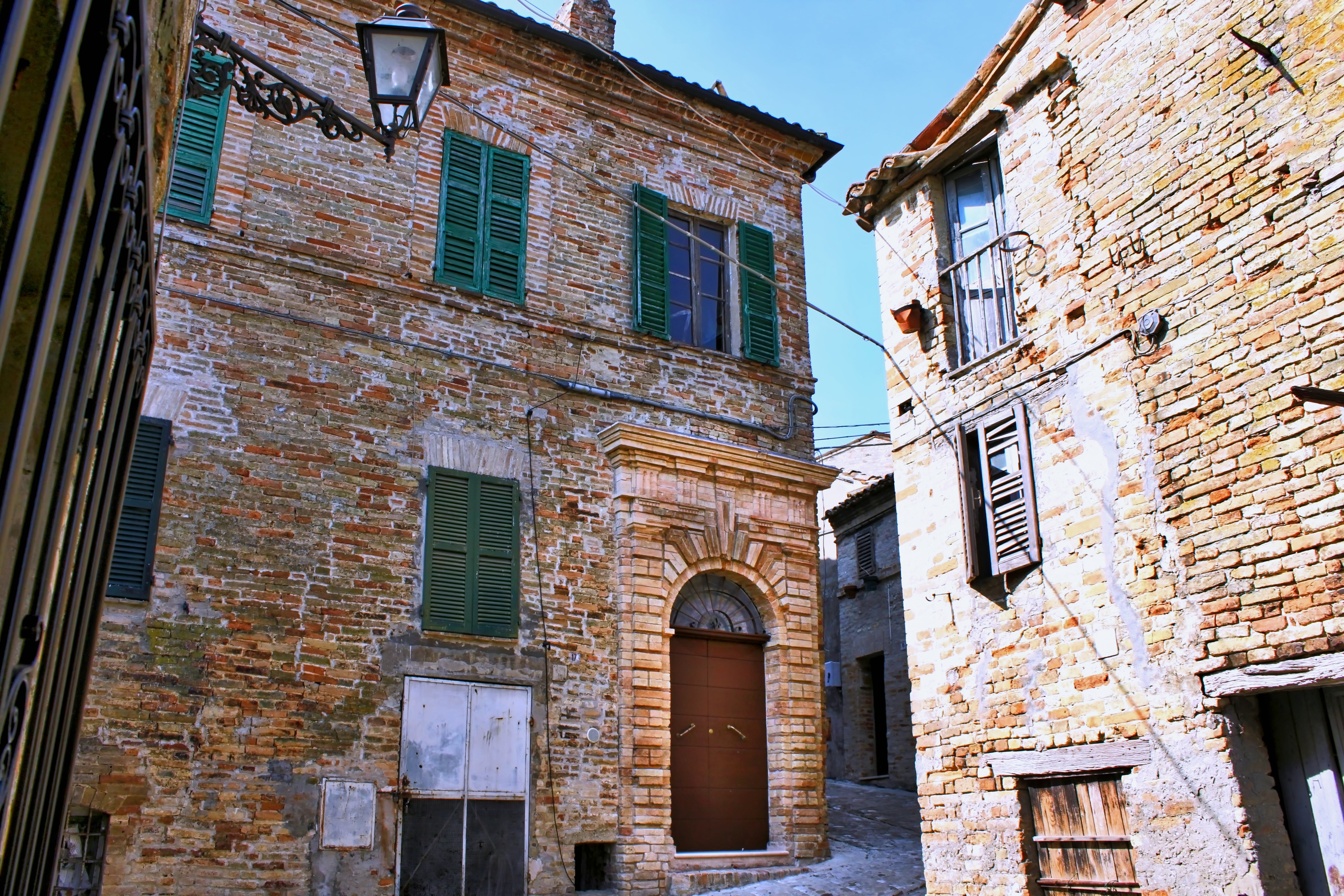 Il portale del Palazzo nobiliare di Boffo da Massa, è il vignolesco portale del Palazzo Garulli che secondo la tradizione popolare sarebbe stato il palazzo di Boffo da Massa, Signore di Carassai tra 1380 e il 1387, che si trova nel castello vecchio.